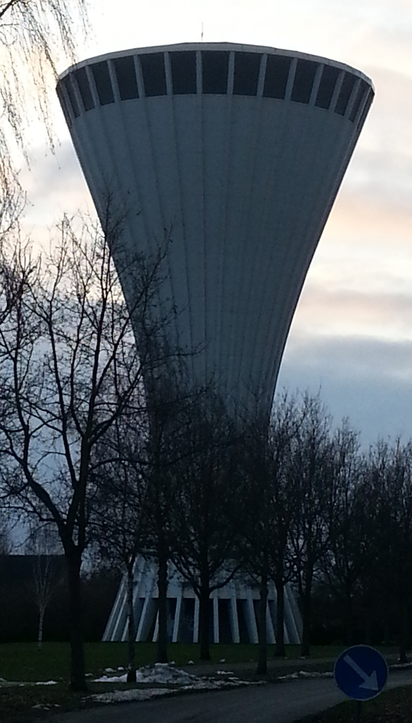 Foto af Vandtårnet på Sjællandsvej